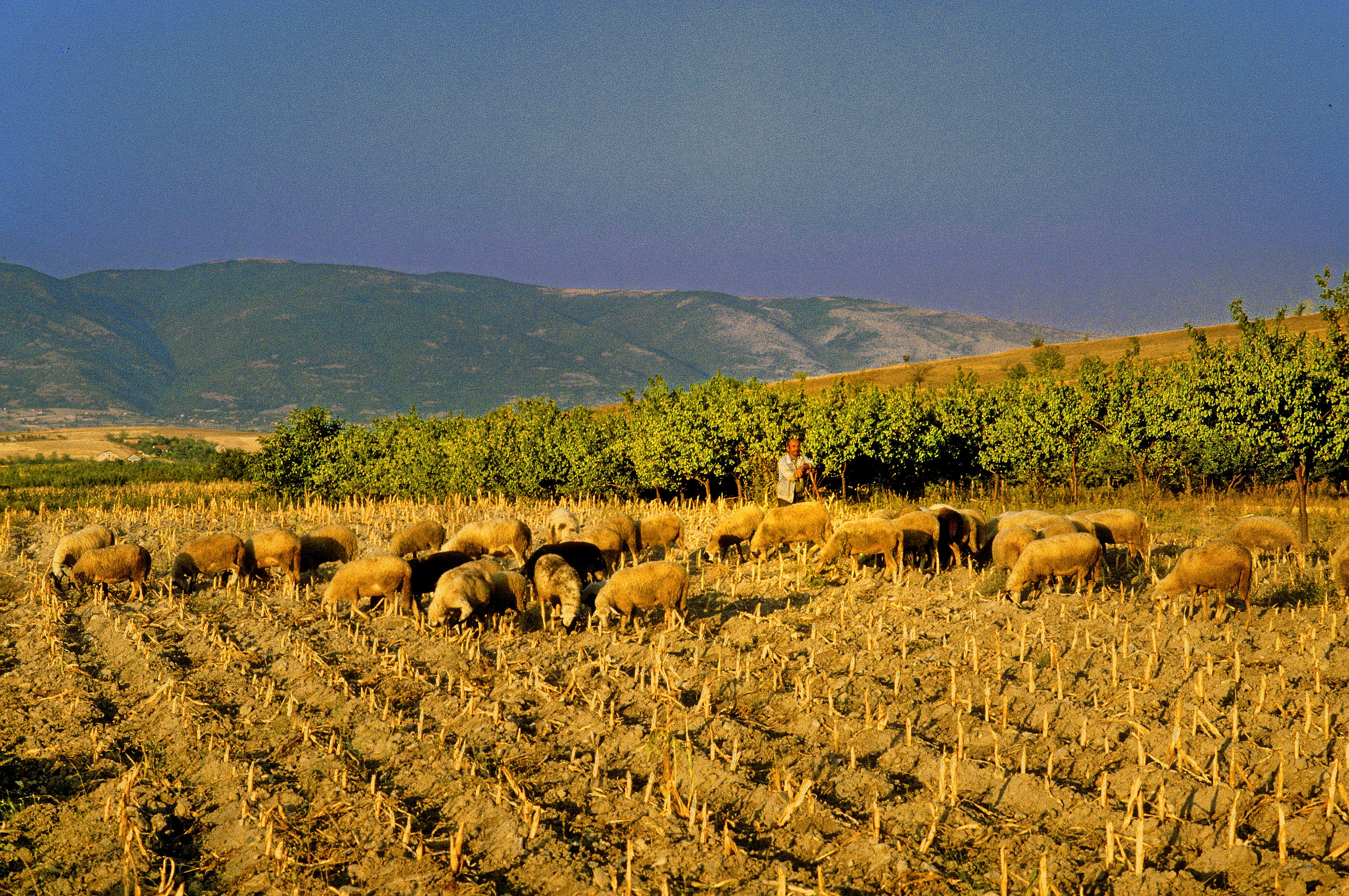 Near Sopište